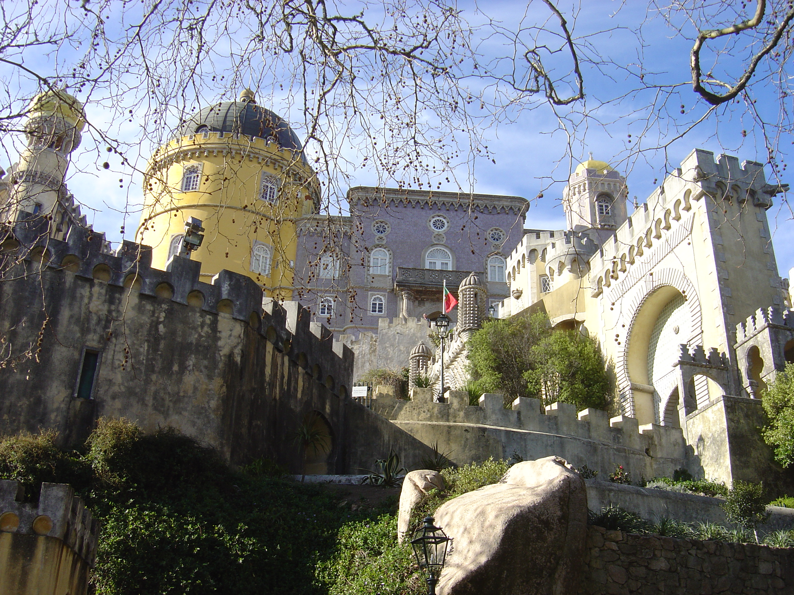 Pena Palace, Sintra, Portugal